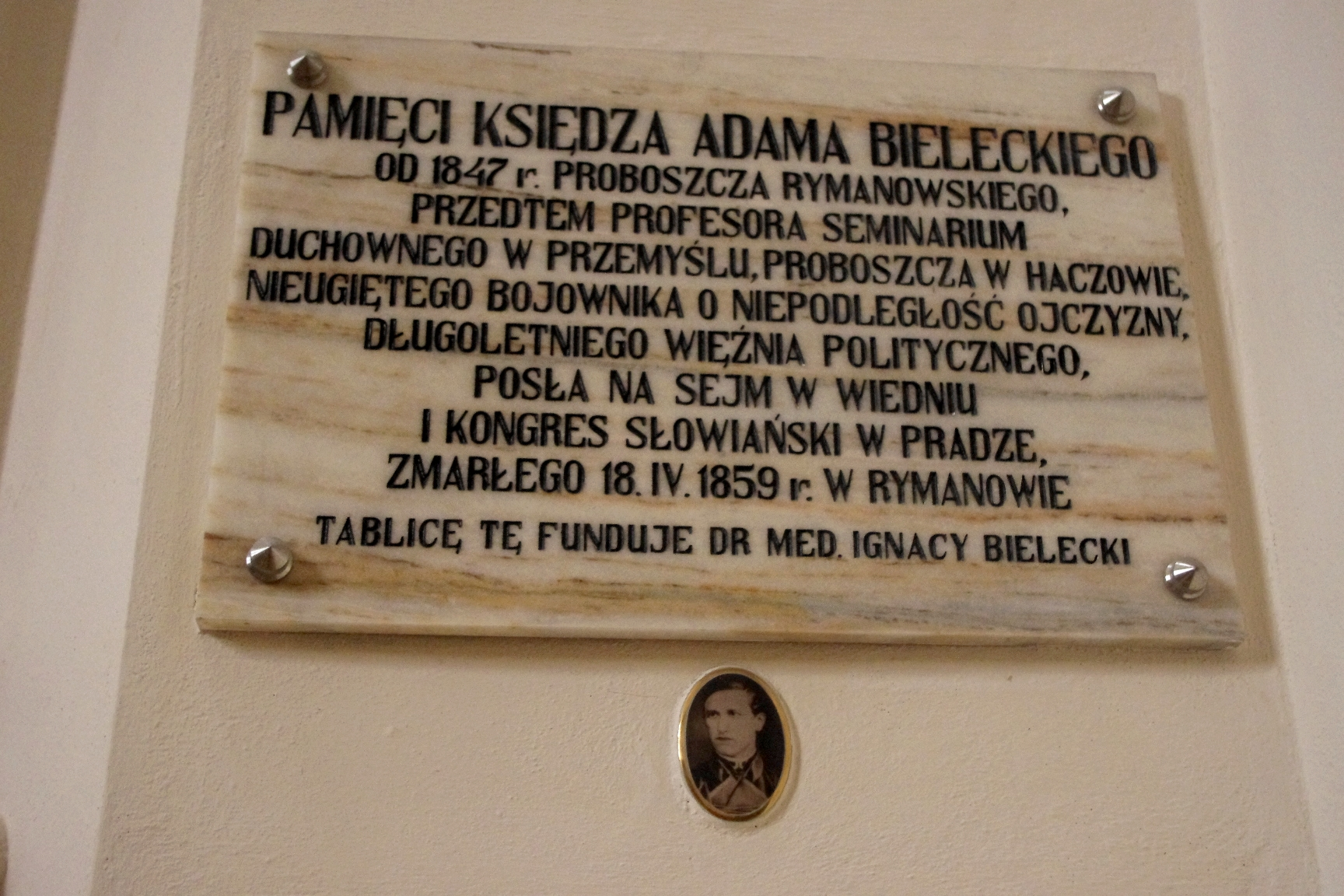 Tablica upamiętniająca ks. Adama Bieleckiego herbu Janina (1811-1859) – działacza niepodległościowego w XIX wieku, w kościele św. Wawrzyńca w Rymanowie